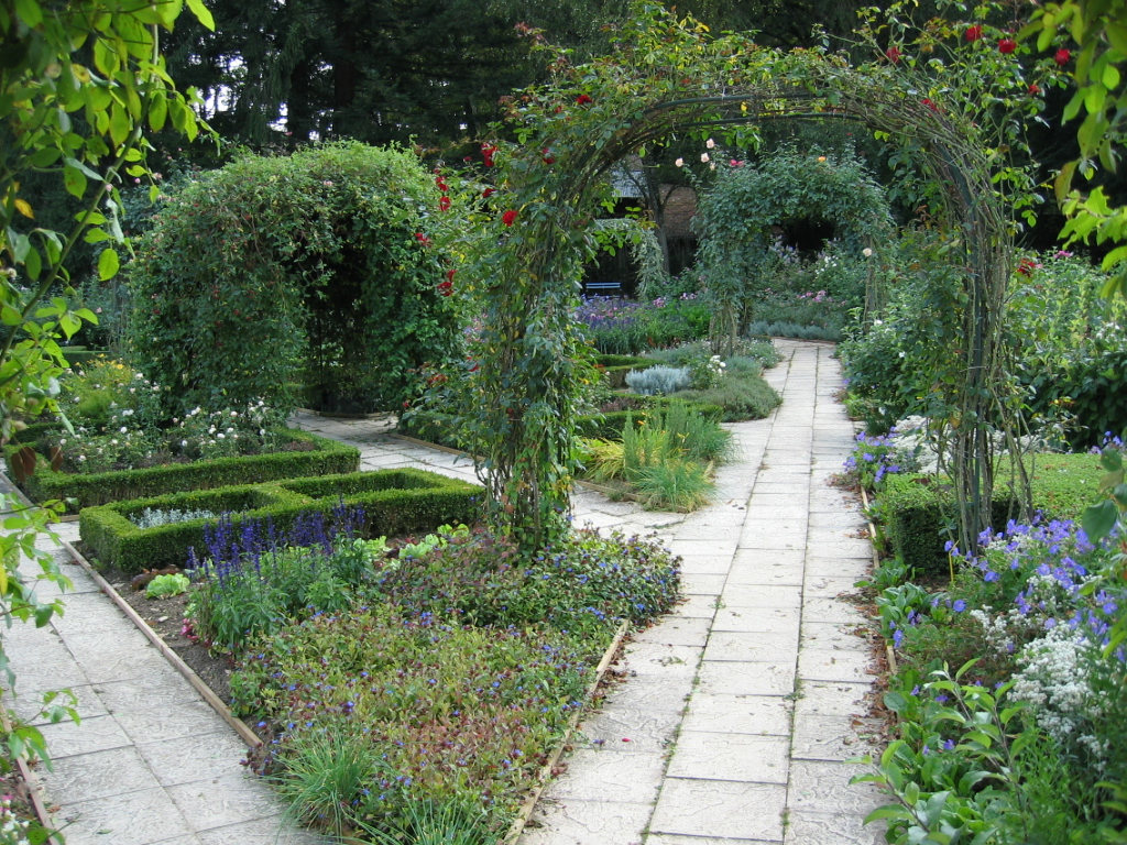 Jardin du Chateau de Arlay dans le Jura (France)